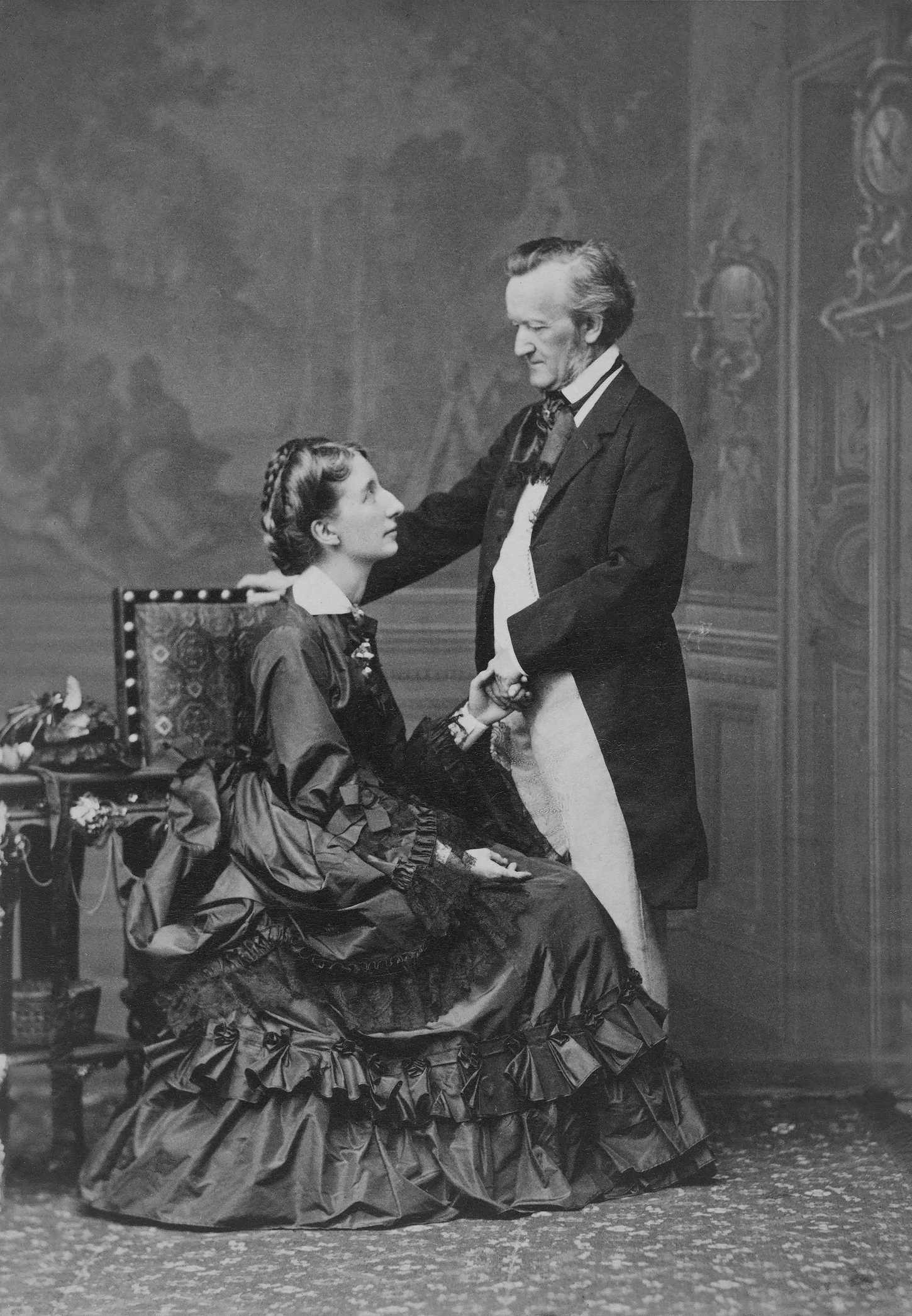 Fotografía tomada en Viena por Fritz Luckhardt (1843-1894) el 9 de mayo de 1872.